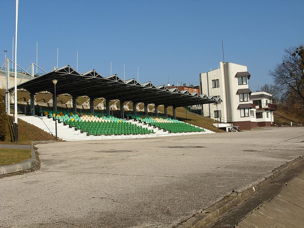 Tor regatowy w Bydgoszczy